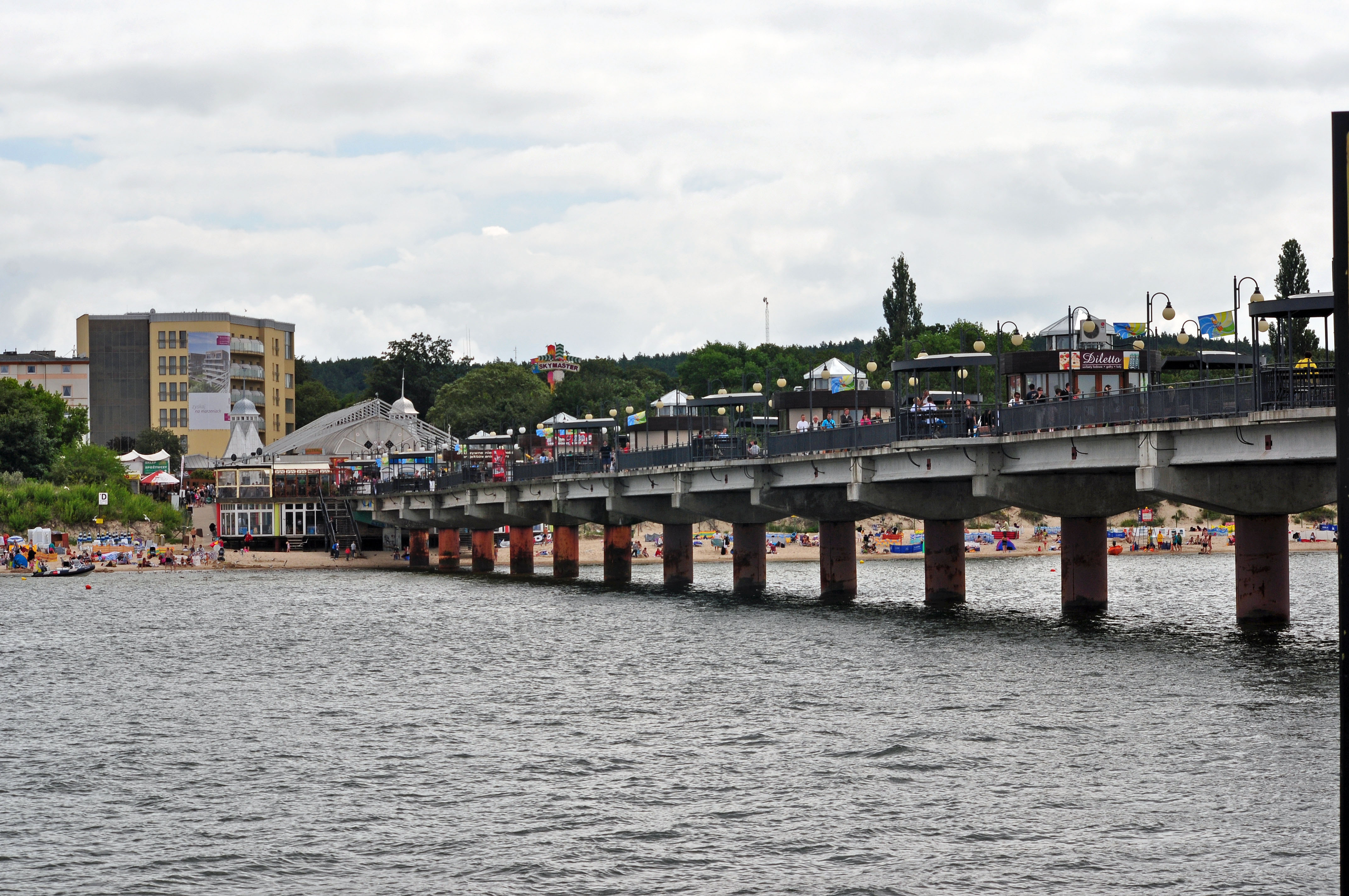 Aufgenommen in Polen im Juli 2011. Die Bilder tragen im Namen Ort und Objekt sowie das Aufnahmedatum.